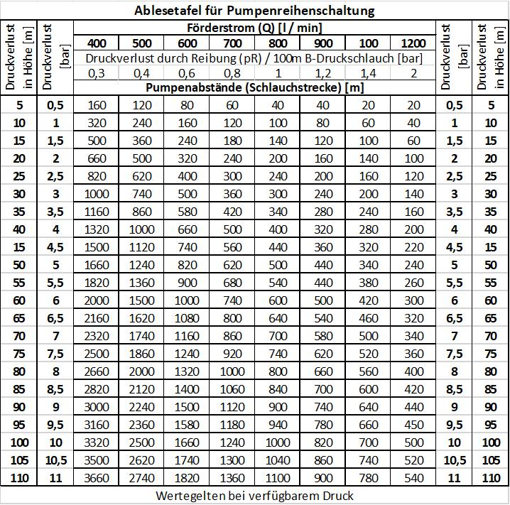 Ablesetafel für Pumpenföderung